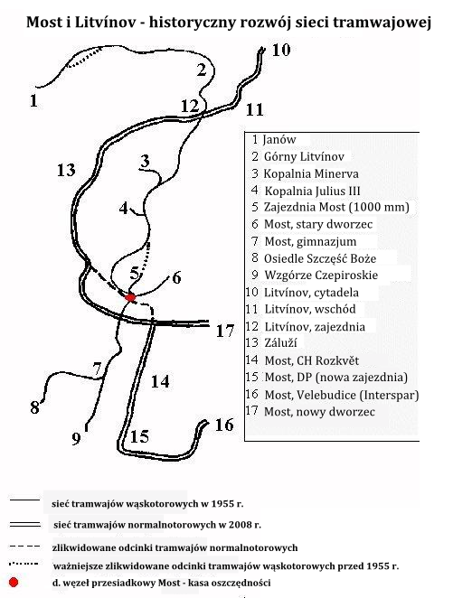 Siť tramvaji v Mostě a Litvínově - historycký vývoj.